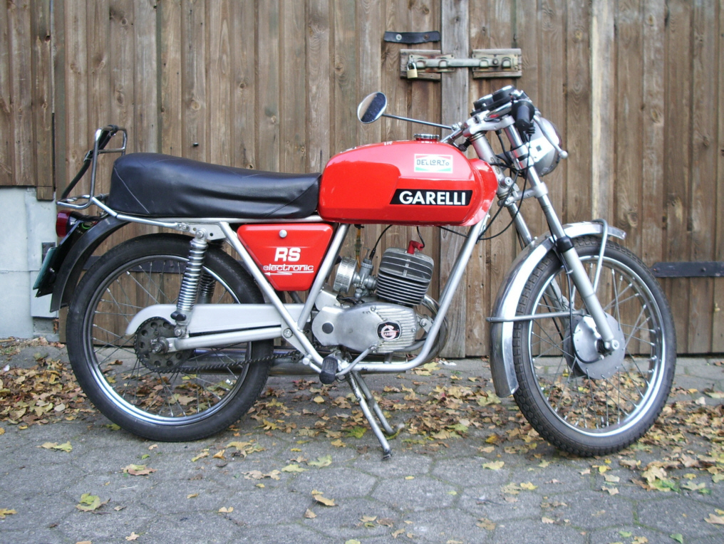 Garelli Kleinkraftrad. Eigenes Fahzeug, selbst fotografiert